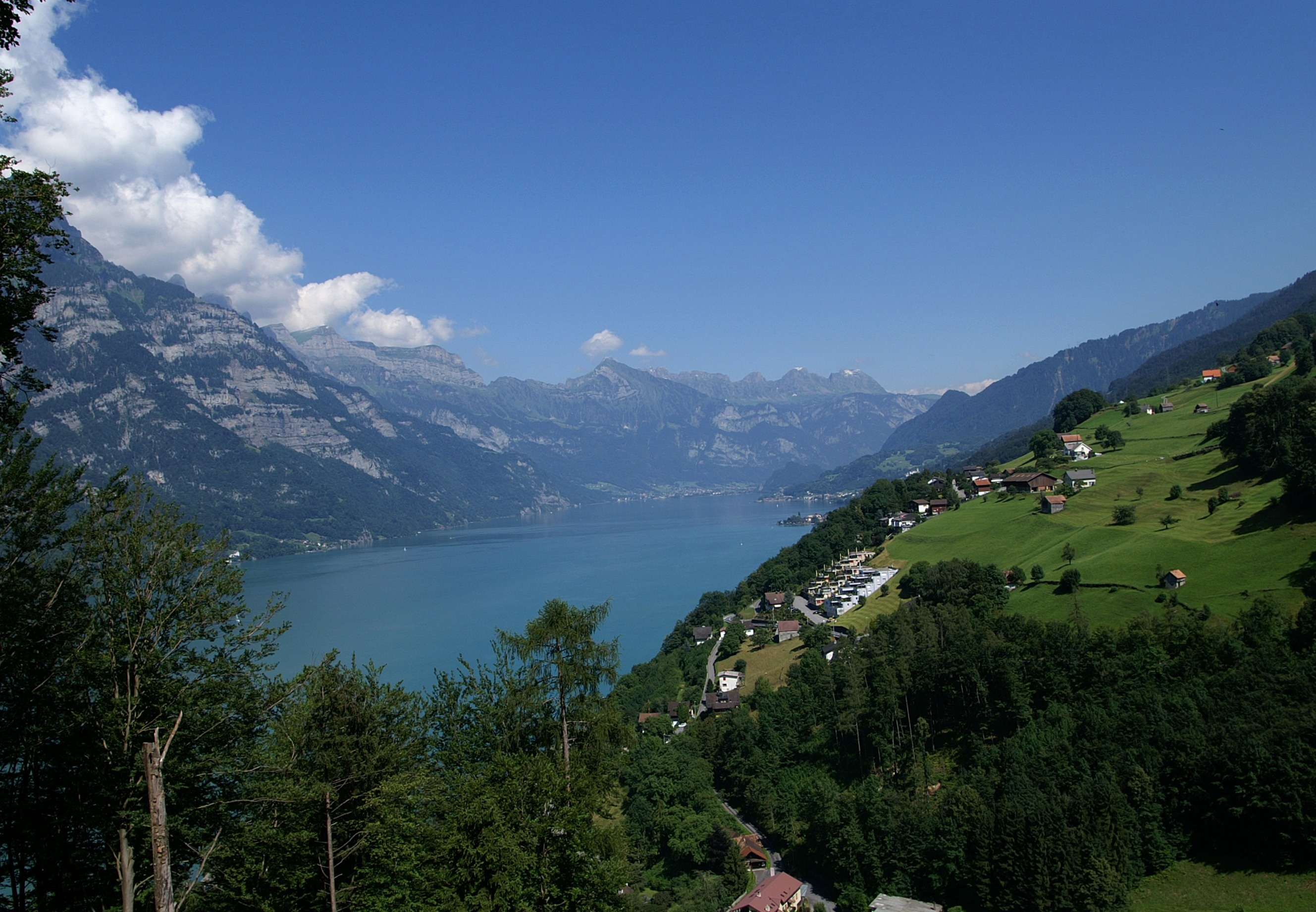 die Gemeinde Mühlehorn ist unterhalb des Kerenzerberges am Südufer des Walensees gelegen.